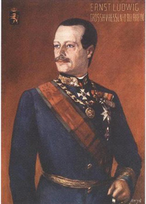 Großherzog Erst-Ludig von Hessen und bei Rhein k.H. als Ehrenoberst des k.u.k. Infanterie-Regiments Nr. 14 in Linz